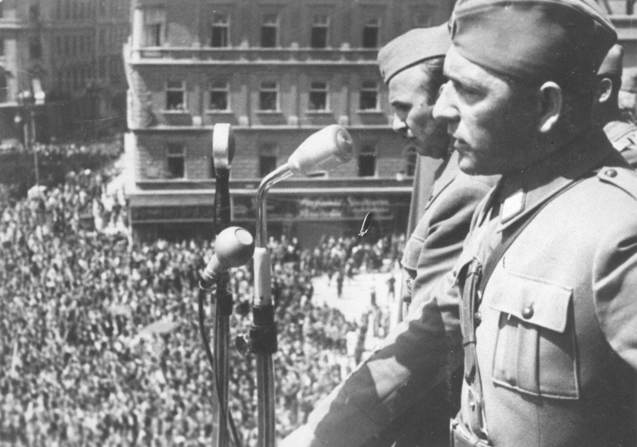 Il generale Ivan Gosnjak a Zagabria nel maggio 1945 dopo la vittoria dei partigiani jugoslavi nella guerra di liberazione